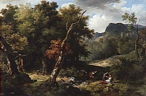 Carloman II blessé à mort dans la forêt d'Yveline (actuelle Forêt domaniale de Lyons - Eure).